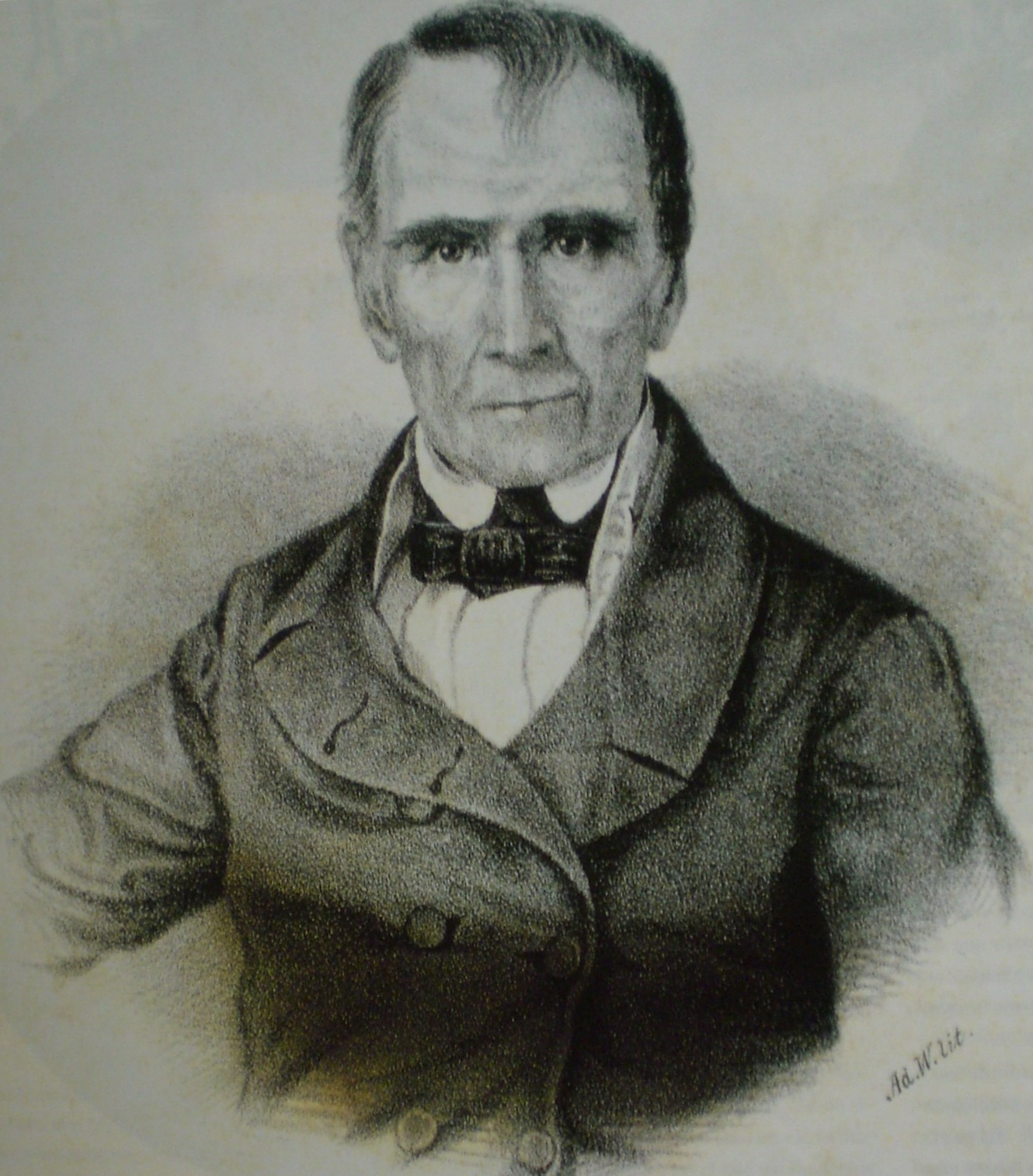 Engraving of José María Vargas